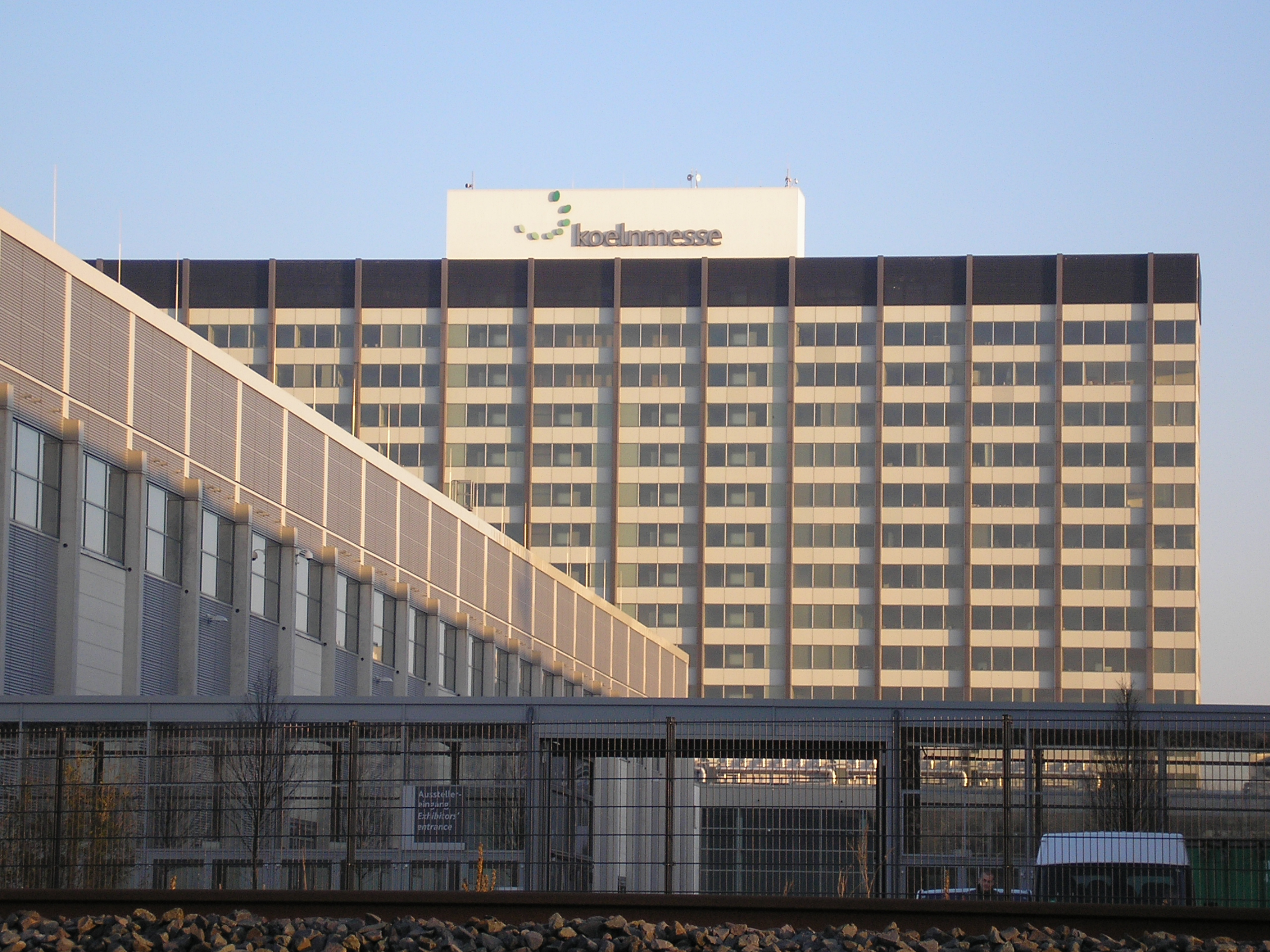 Messehochhaus, Verwaltung der koelnmesse, Messeplatz 1, Köln-Deutz. Blick vom Rheinpark, links Messehalle 7, im Vordergrund die Gleise der ICE-Strecke zum Bahnhof Deutz-Tief